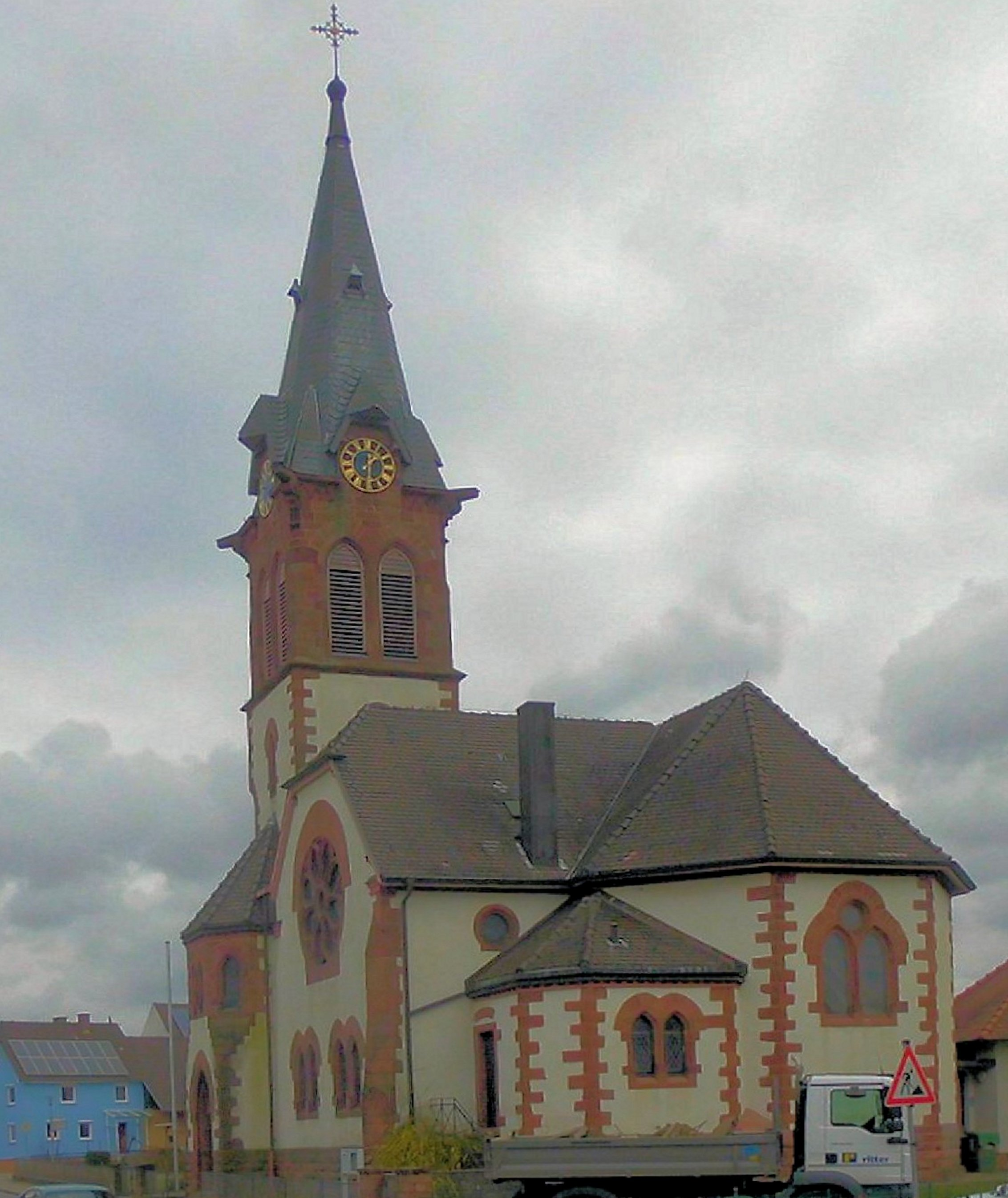 Erlöserkirche in Kippenheimweiler, Stadt Lahr/Schwarzwald, Ortenaukreis, Baden-Württemberg